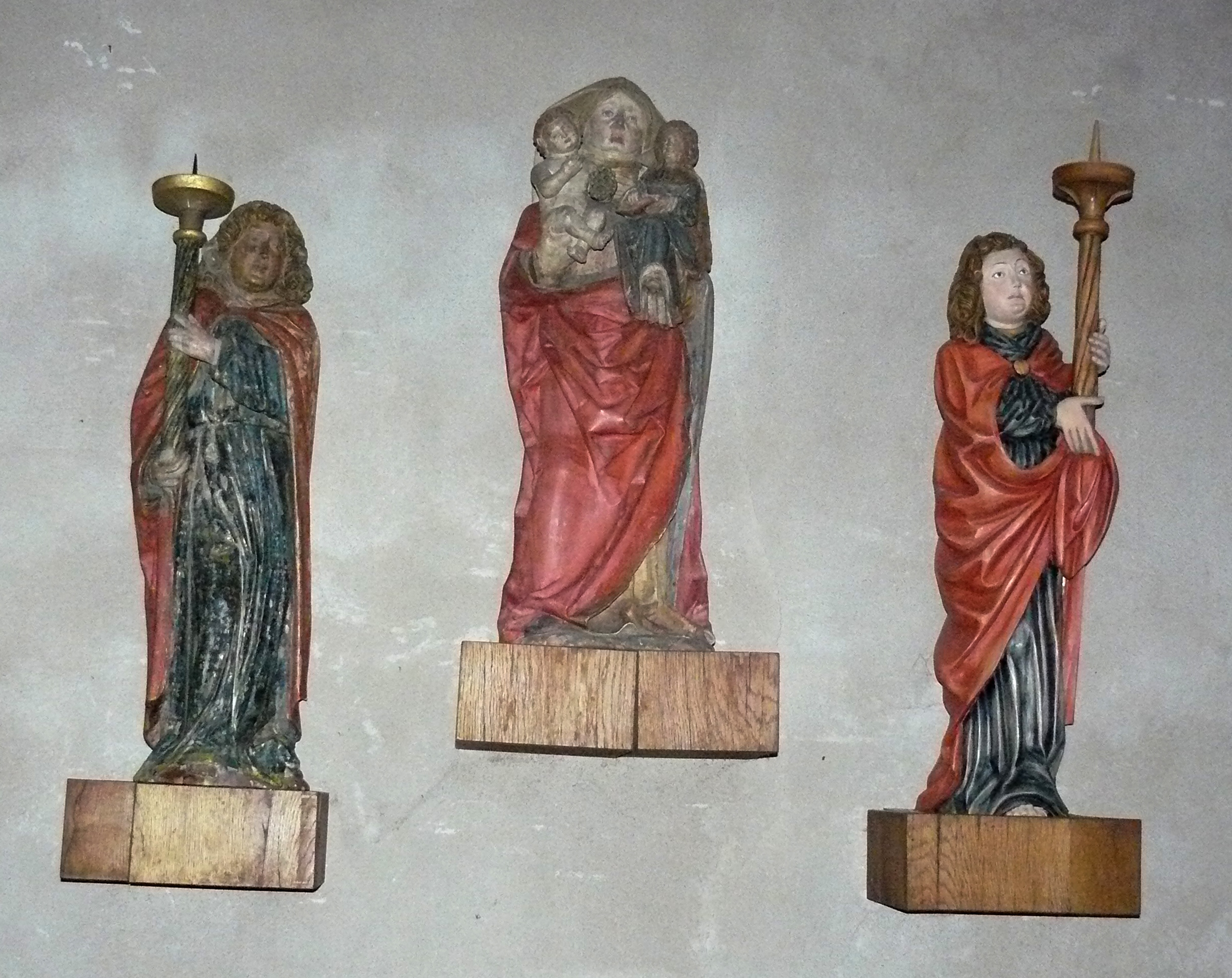 Statues polychromes de Sainte Anne (Fin du XVe et début du XVIe) et de 2 anges céroféraires (XVIe)